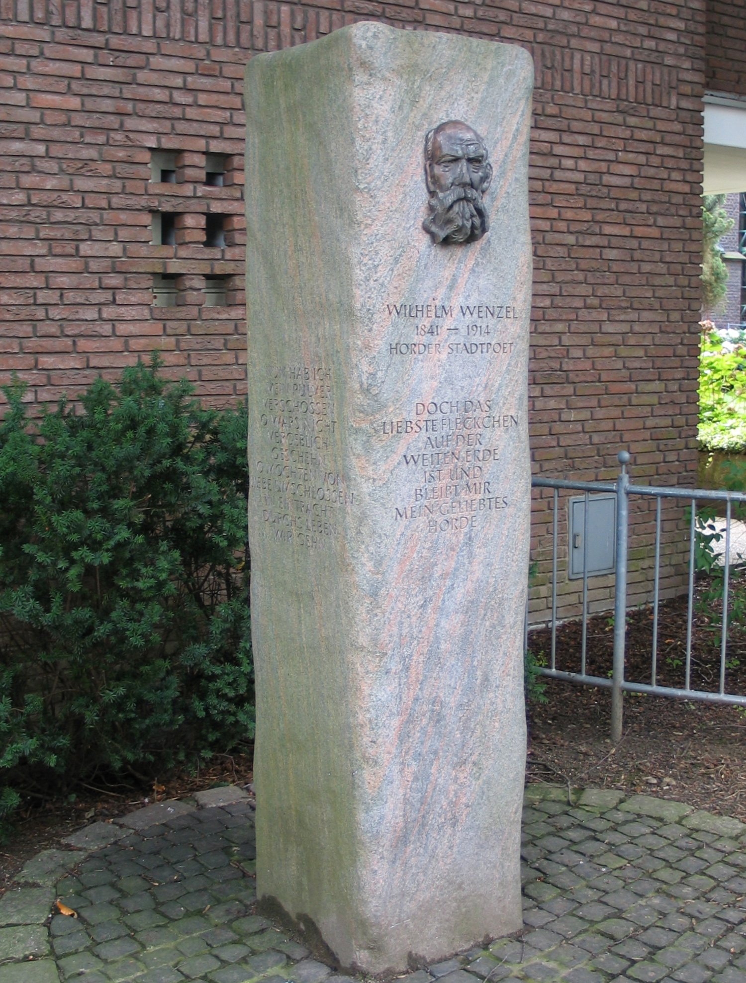 Denkmal zu Ehren von Wilhelm Wenzel in der Wenzelstraße Dortmund-Hörde